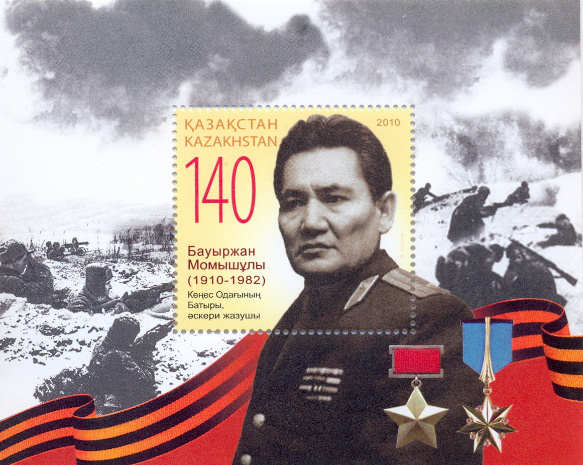 2010. Сентябрь, 24. Почтовый блок с одной маркой серии «Памятные, юбилейные даты и праздники» на тему «100 лет со дня рождения Героя Советского Союза, военного писателя Бауыржан Момышулы».